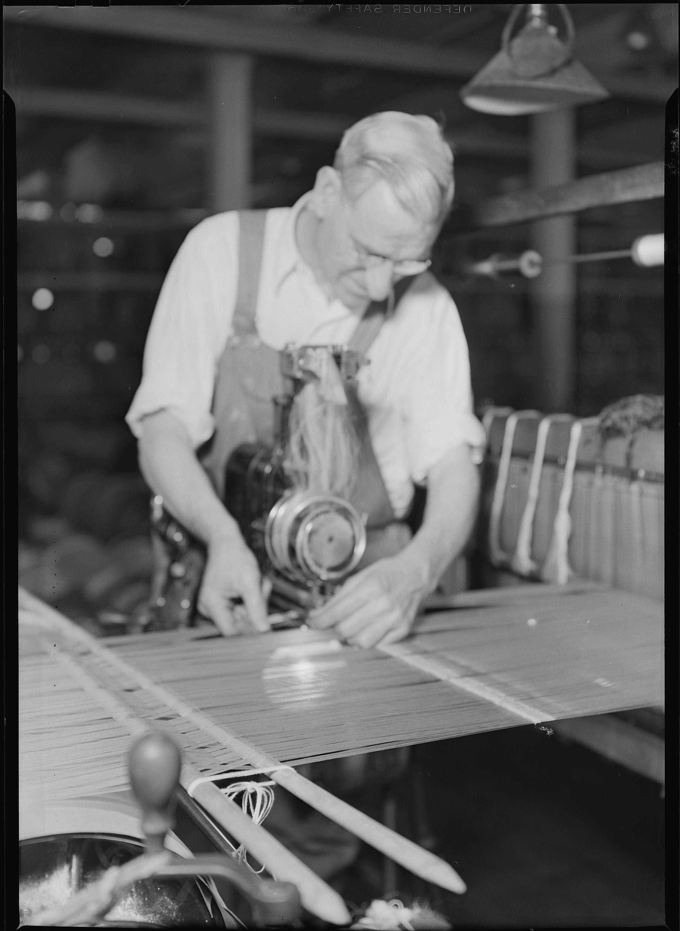 Maschinelles Andrehen der Webkette